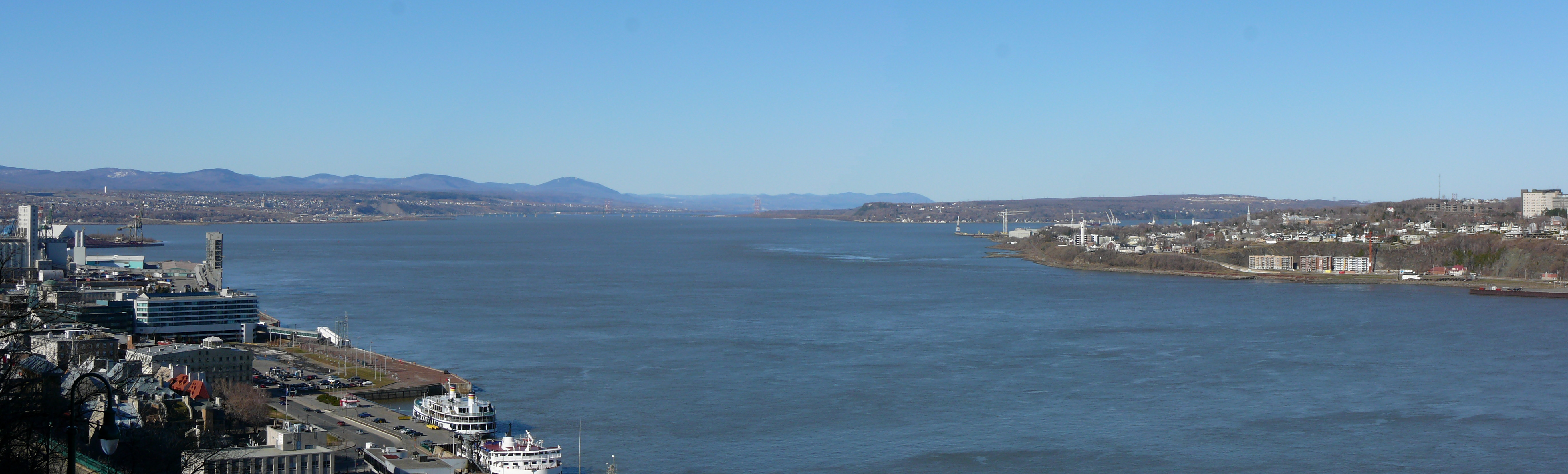 Fleuve Saint-Laurent entre Québec (à gauche) et Lévis (à droite)